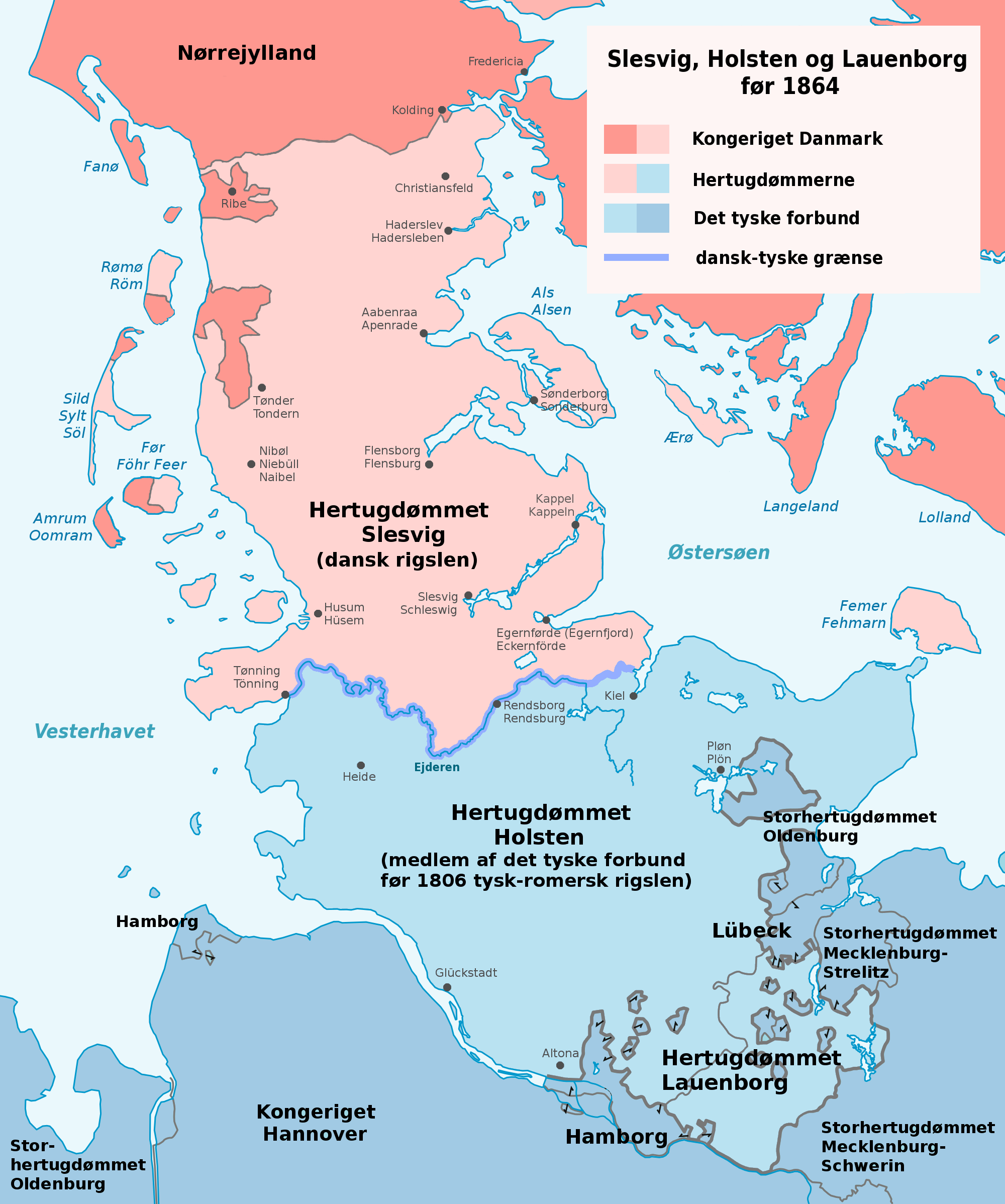 Hertugdømmerne Slesvig, Holsten og Lauenborg (før 1864)